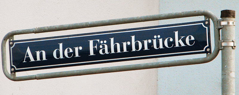 Dieses Bild zeigt ein Straßenschild Stralsunds.